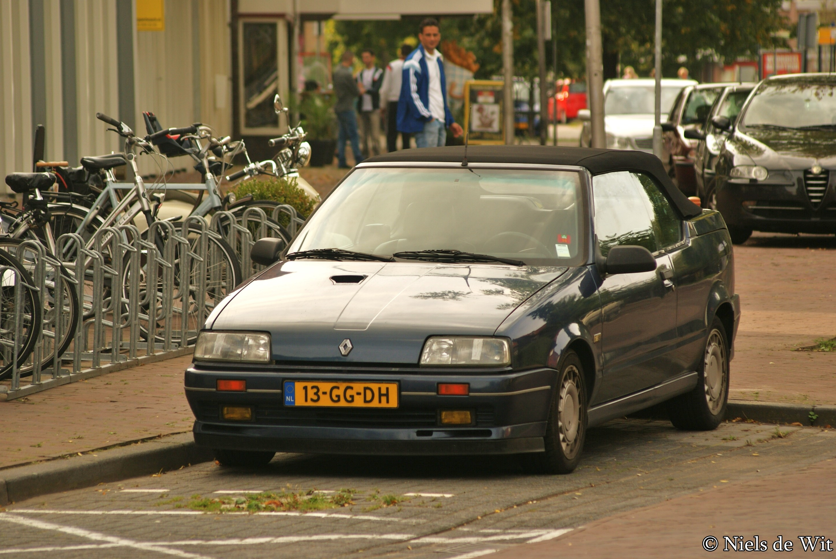 13-GG-DH